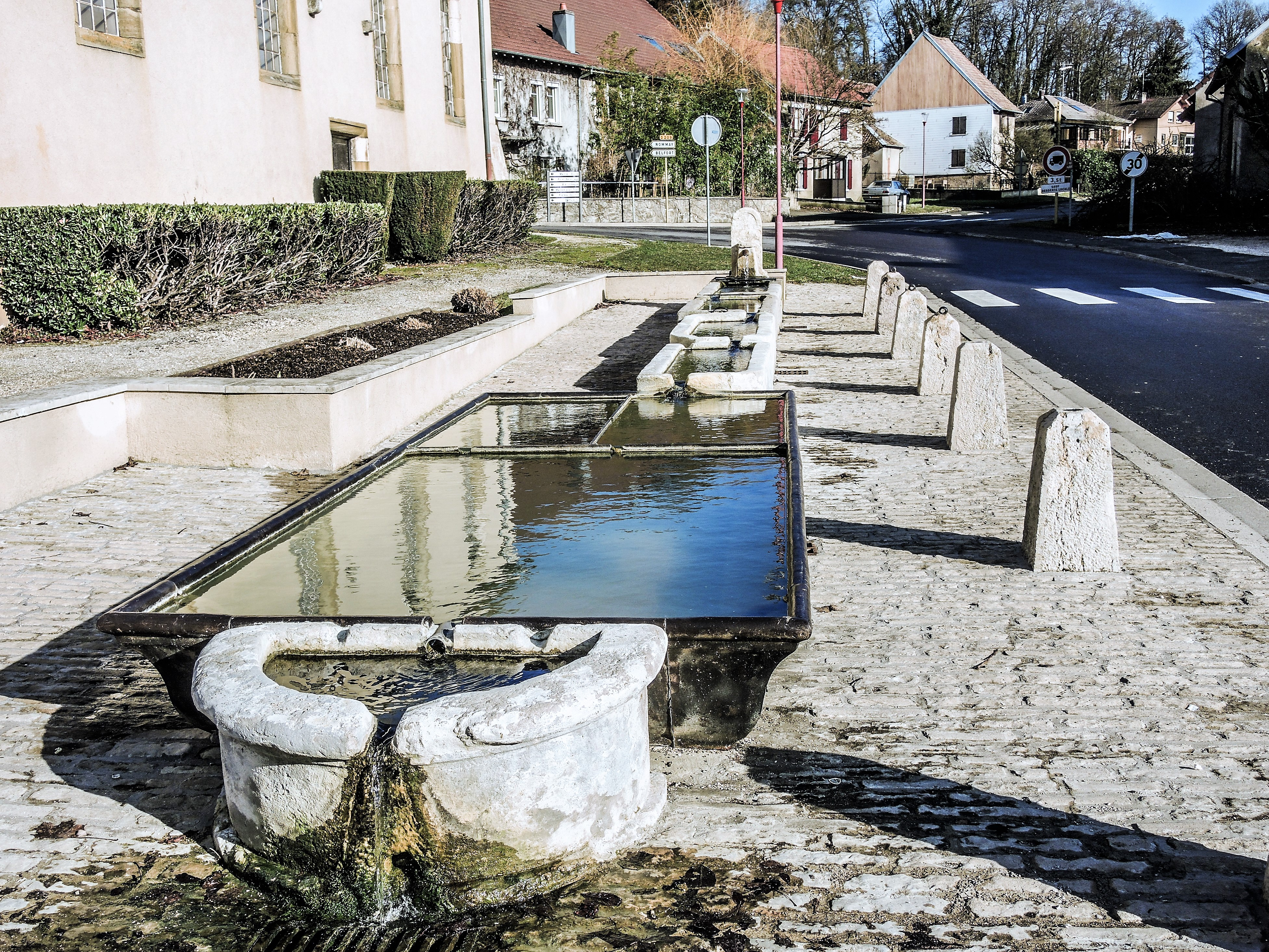 Fontaine-lavoir-abreuvoir, près du temple de Dambenois. Doubs